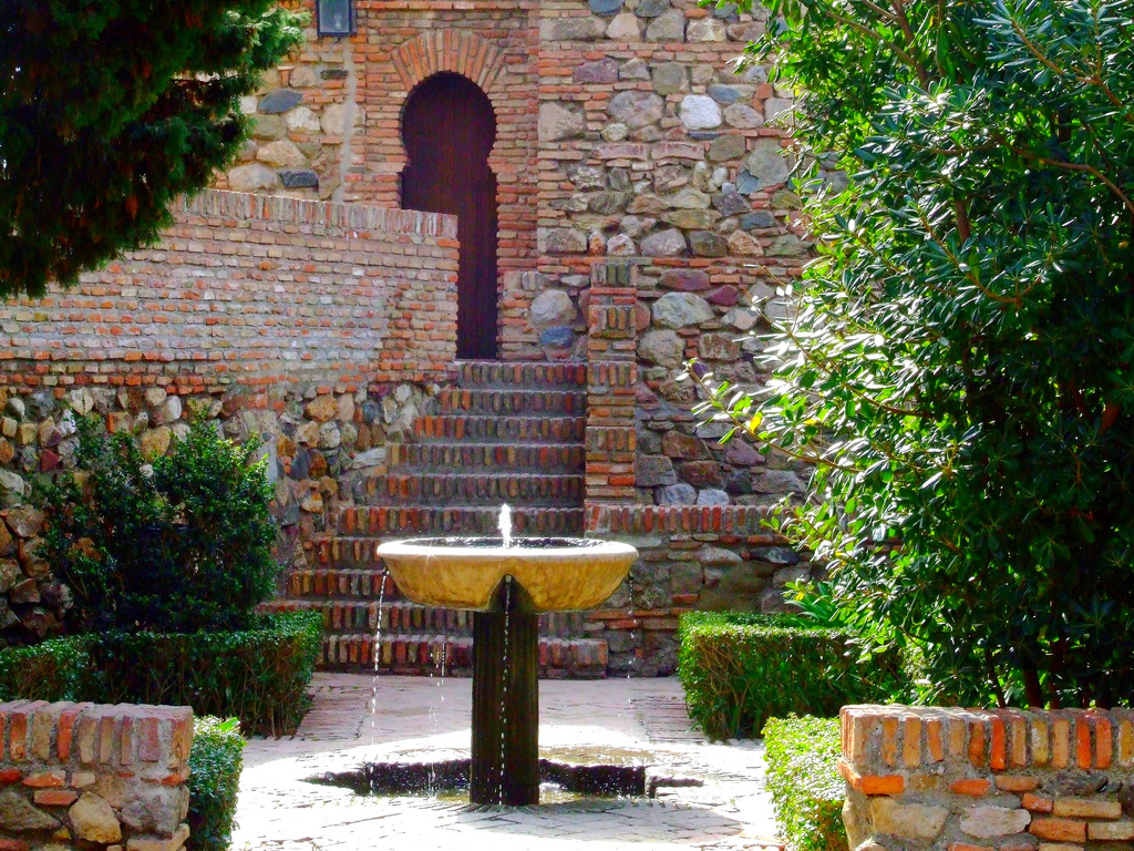 Patio de Surtidores, Alcazaba de Málaga.